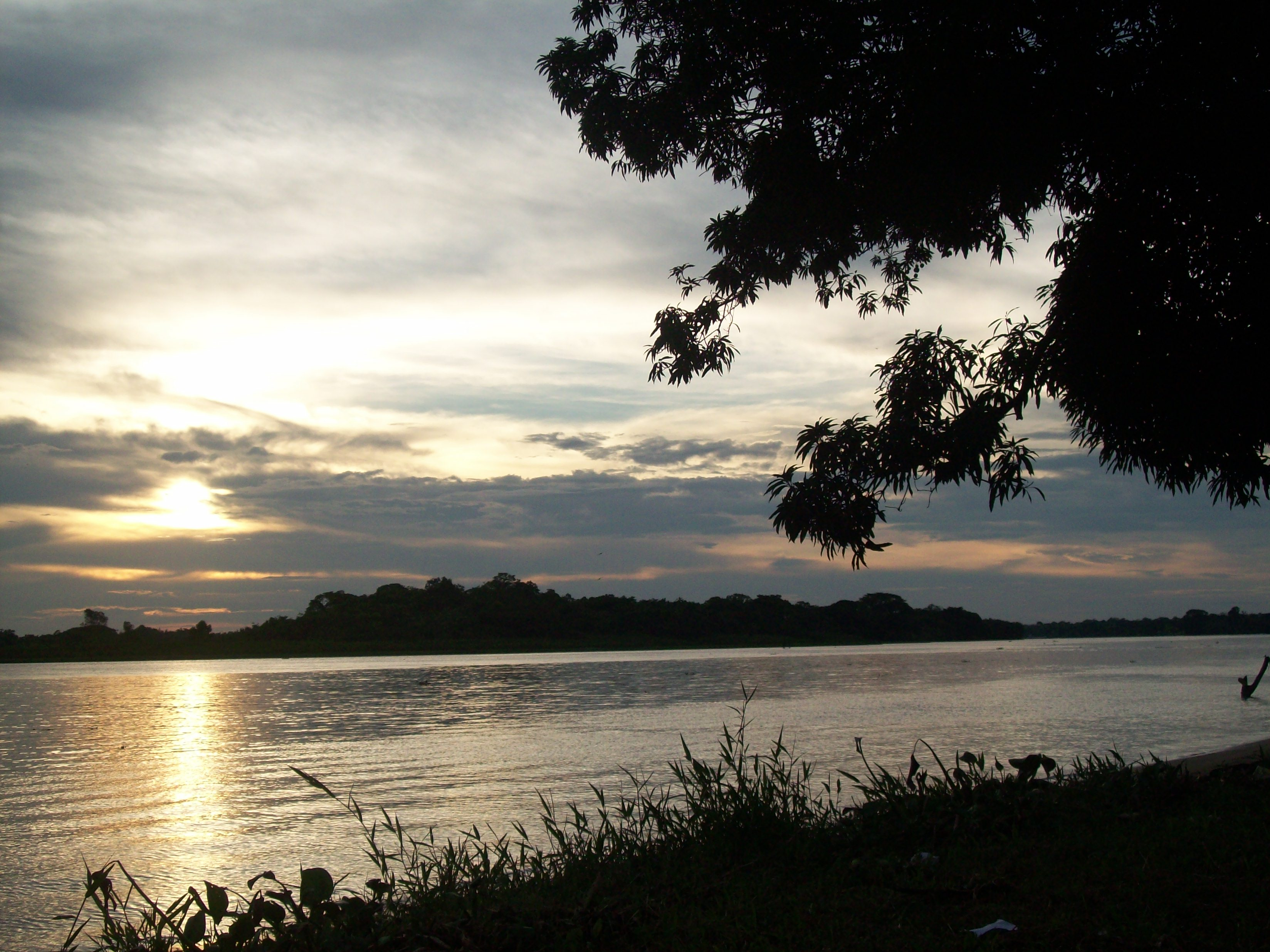 Tomada en horas de la tarde desde el Malecón o paseo del Caño Manamo ubicado en la Ciudad de Tucupita Delta Amacuro